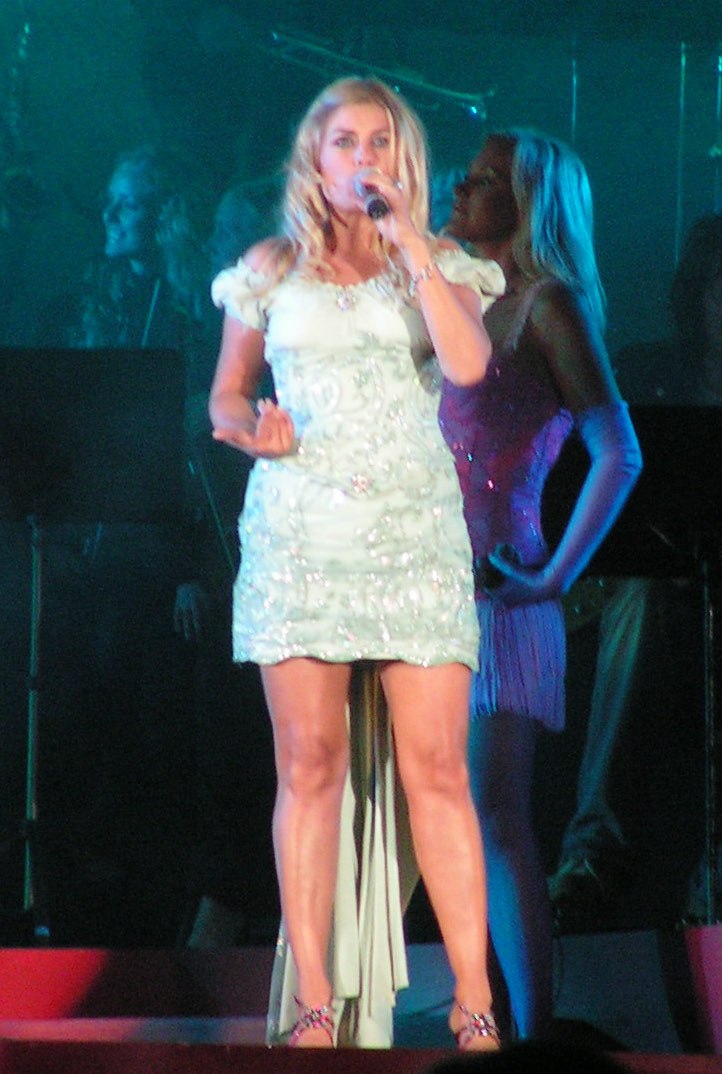 Pernilla Wahlgren och Jessica Andersson